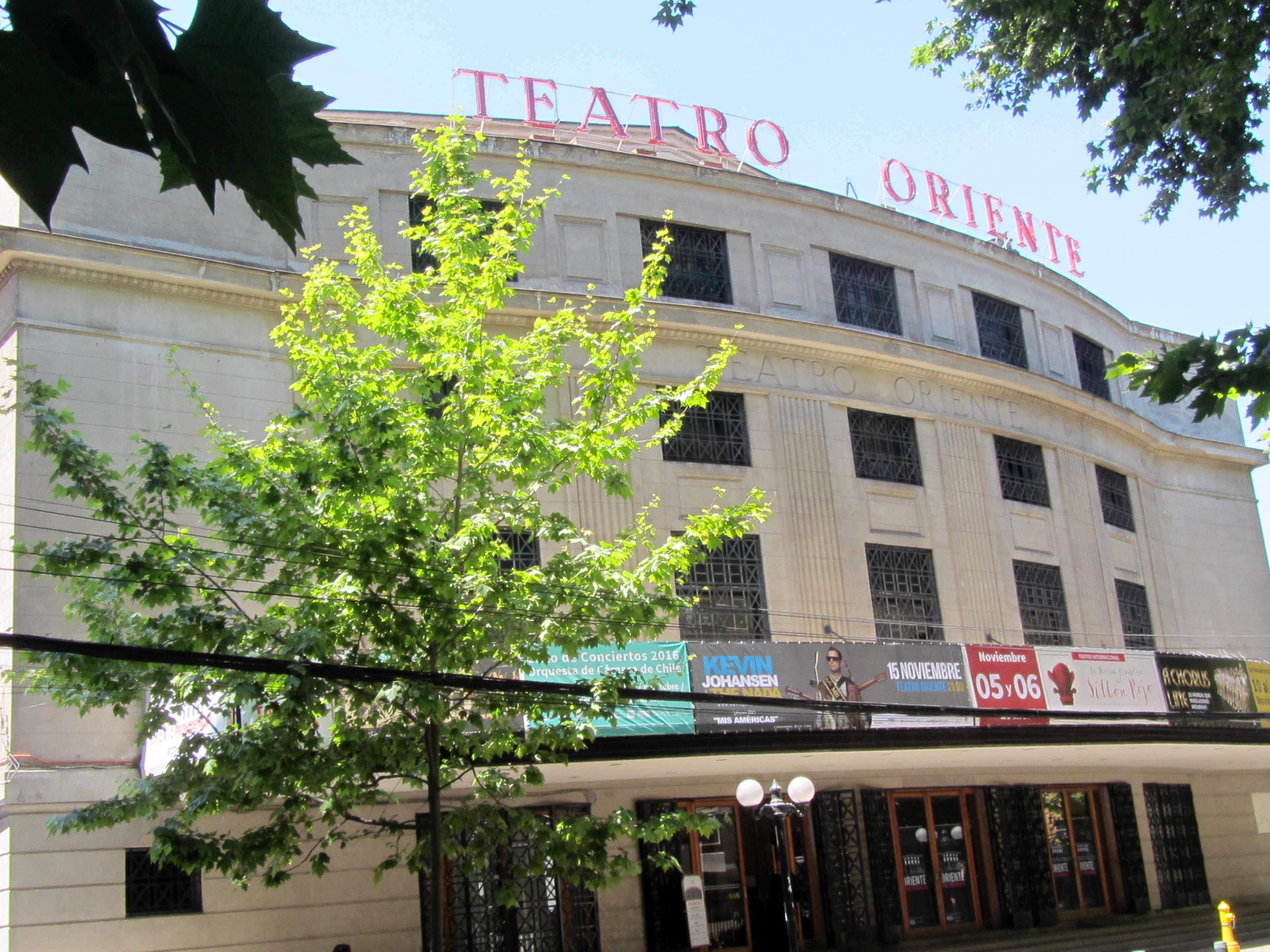 El Teatro Oriente, ubicado en la avenida Pedro de Valdivia 99, Providencia, Santiago de Chile.